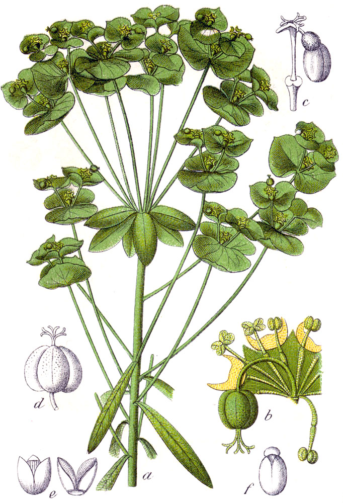 Euphorbia esula L. s. str. Original Caption Brachwurz, Euphorbia esula